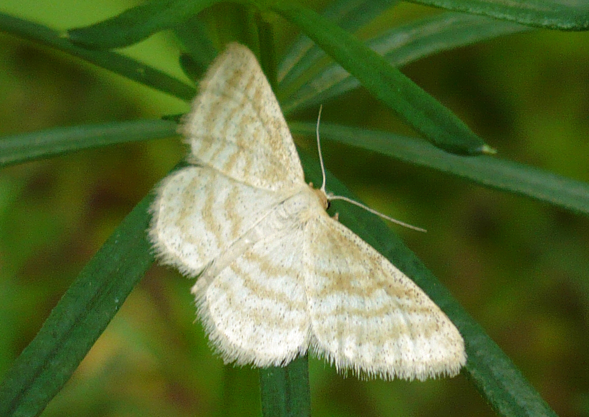 Пяденица малая бледная (Idaea pallidata). Балка Пёстрая, Шебекинский район Белгородской области.